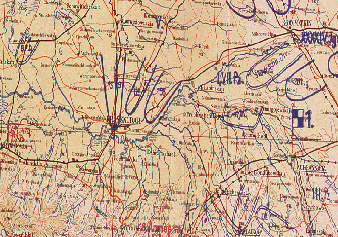 Рабочая карта командующего 17 немецкой армии (8-13 августа 1942г.)